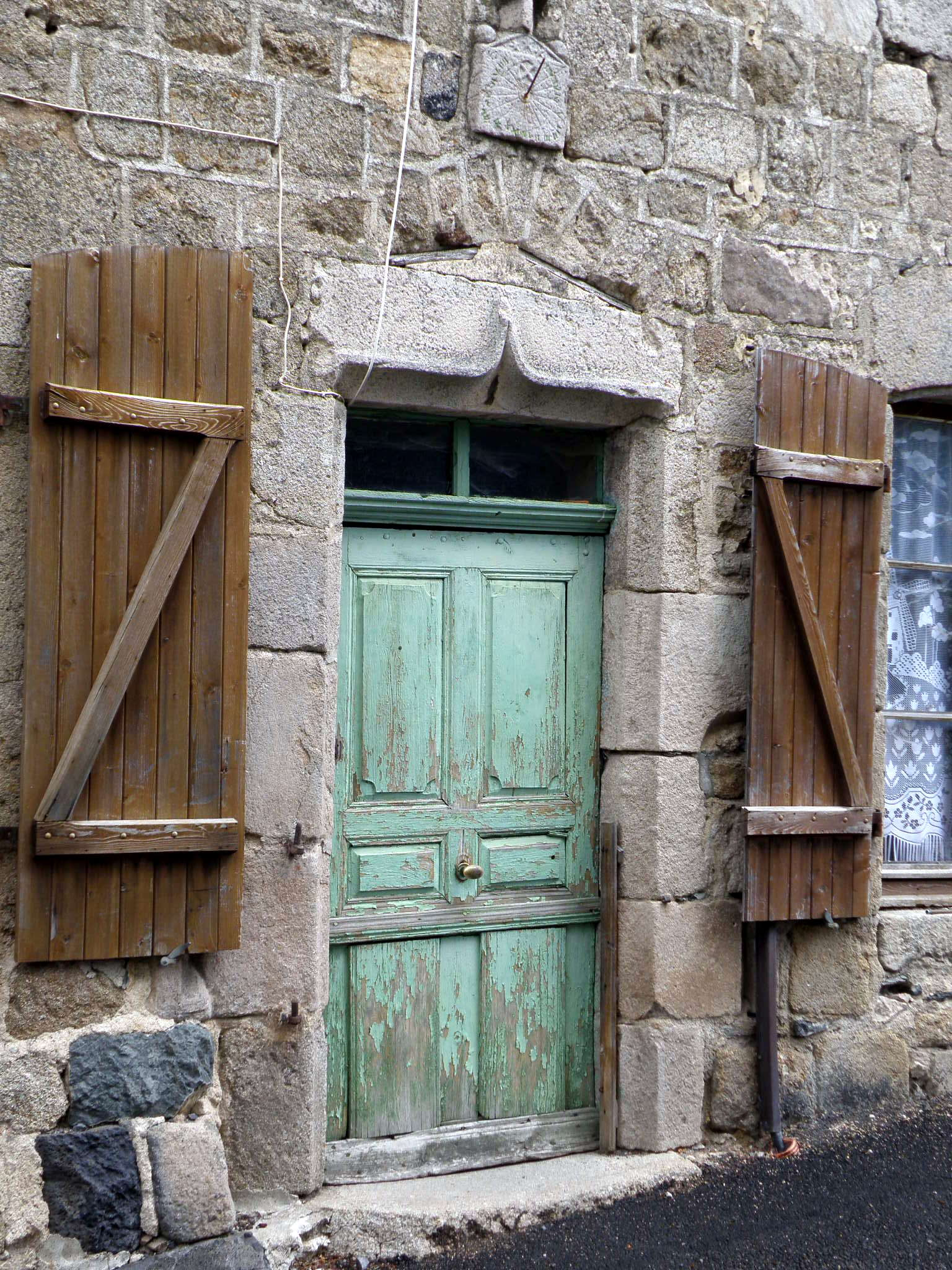 Roche-en-Régnier, comm. de la Haute-Loire, France (Auvergne). Porte de la maison Burianne, avec linteau en accolade, et surmontée d'un cadran solaire.